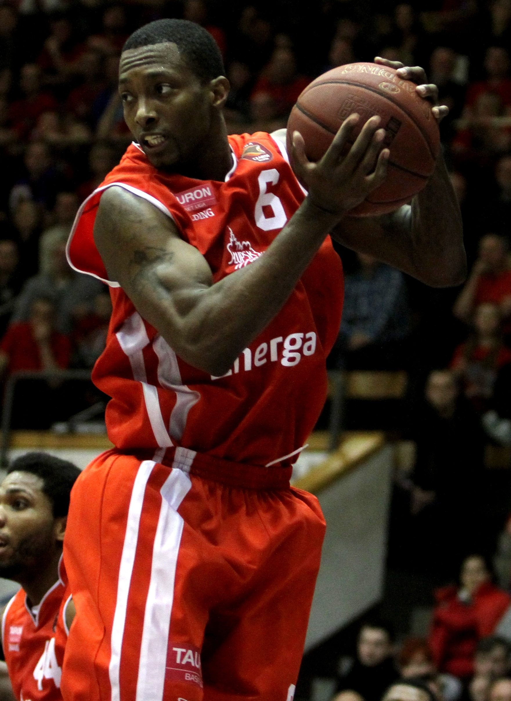 Rodderick Trice, Energa Czarni Słupsk